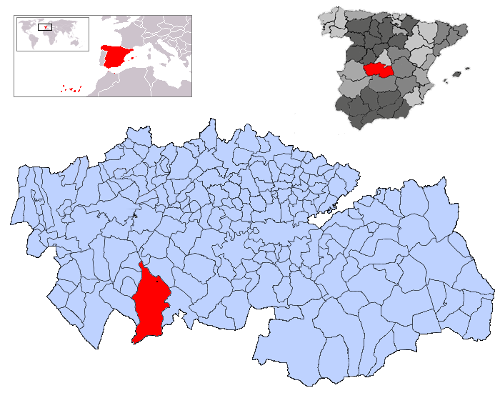 Los Navalucillos en la provincia de Toledo